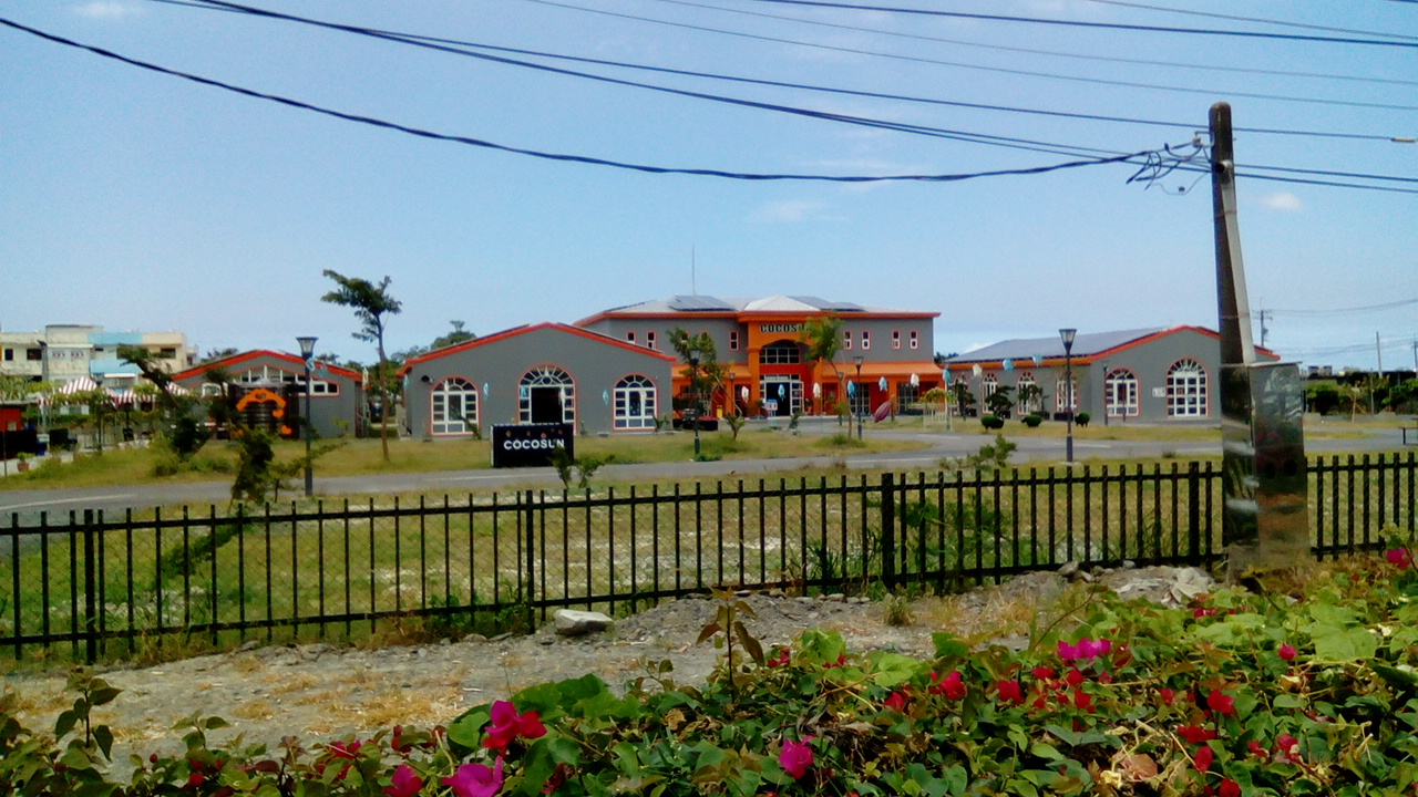 同上 位於台一線南下往恆春路段 近屏南工業區